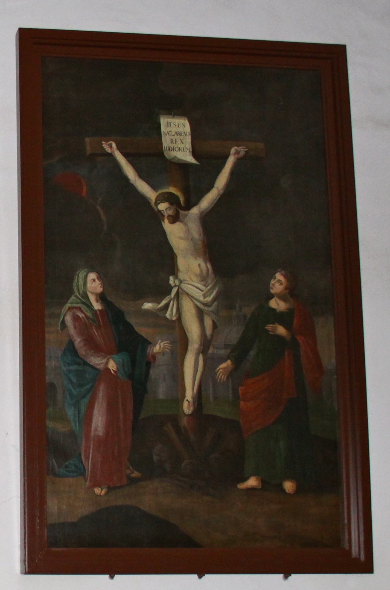 Altarbild der Ludgerikirche